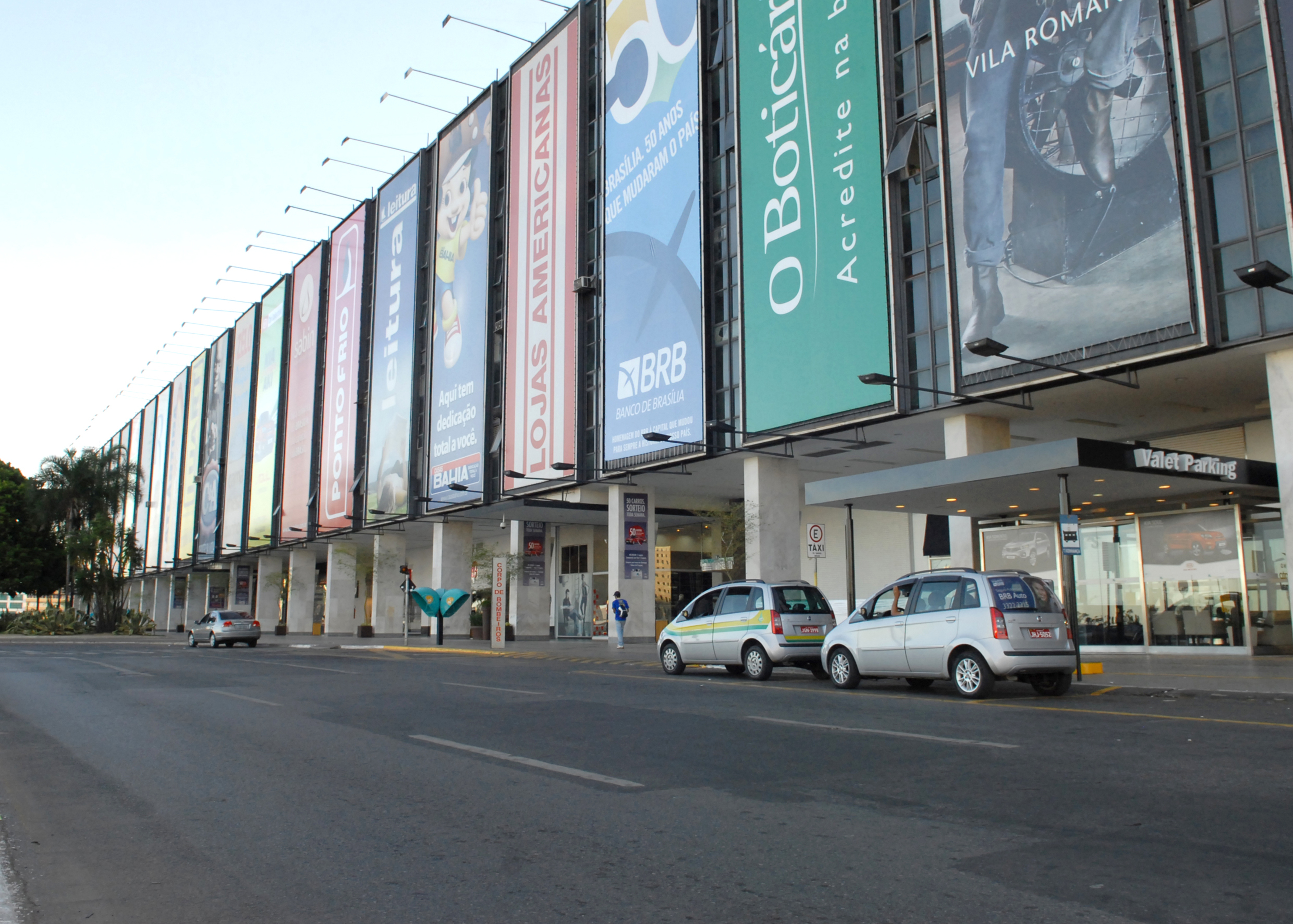 Brasília - Ruas desertas do Plano Piloto durante a estreia do Brasil na Copa do Mundo